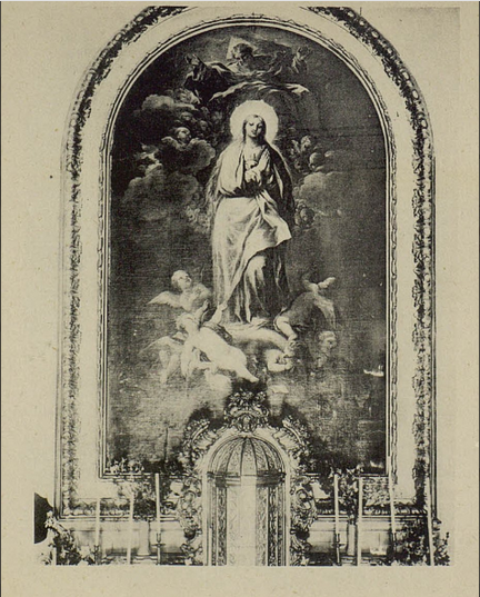 Interior de la ermita de la Cara de Dios (oficialmente Capilla de la Inmaculada Concepción), altar mayor de la capilla con la Inmaculada Concepción, obra de Lucas Jordán, que daba su nombre oficial a la capilla